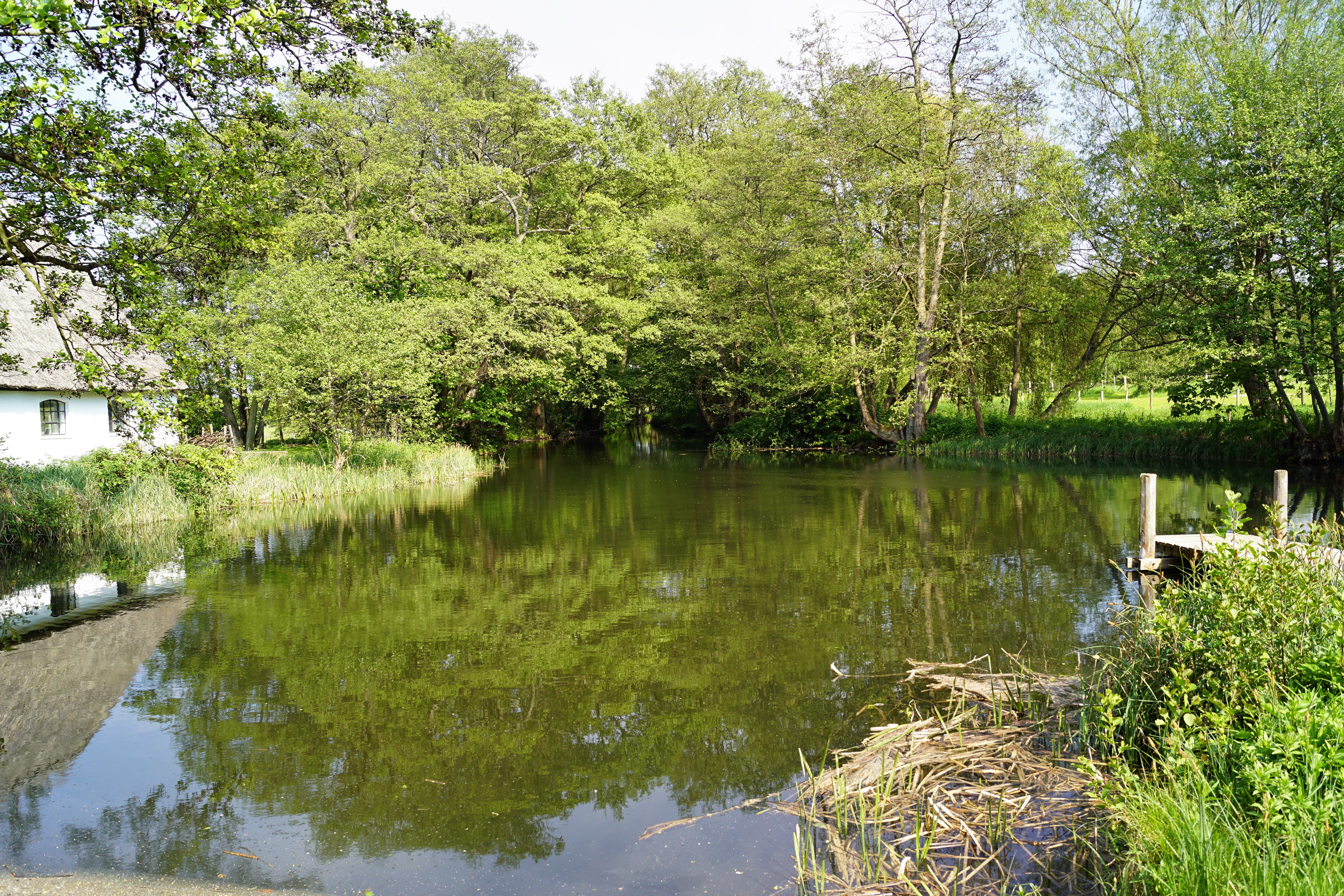 Esrum å og mølledammen ved Esrum Møllegård